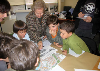 Zumalakarregi_Museoa_Talleres_Intergeneracionales.jpg